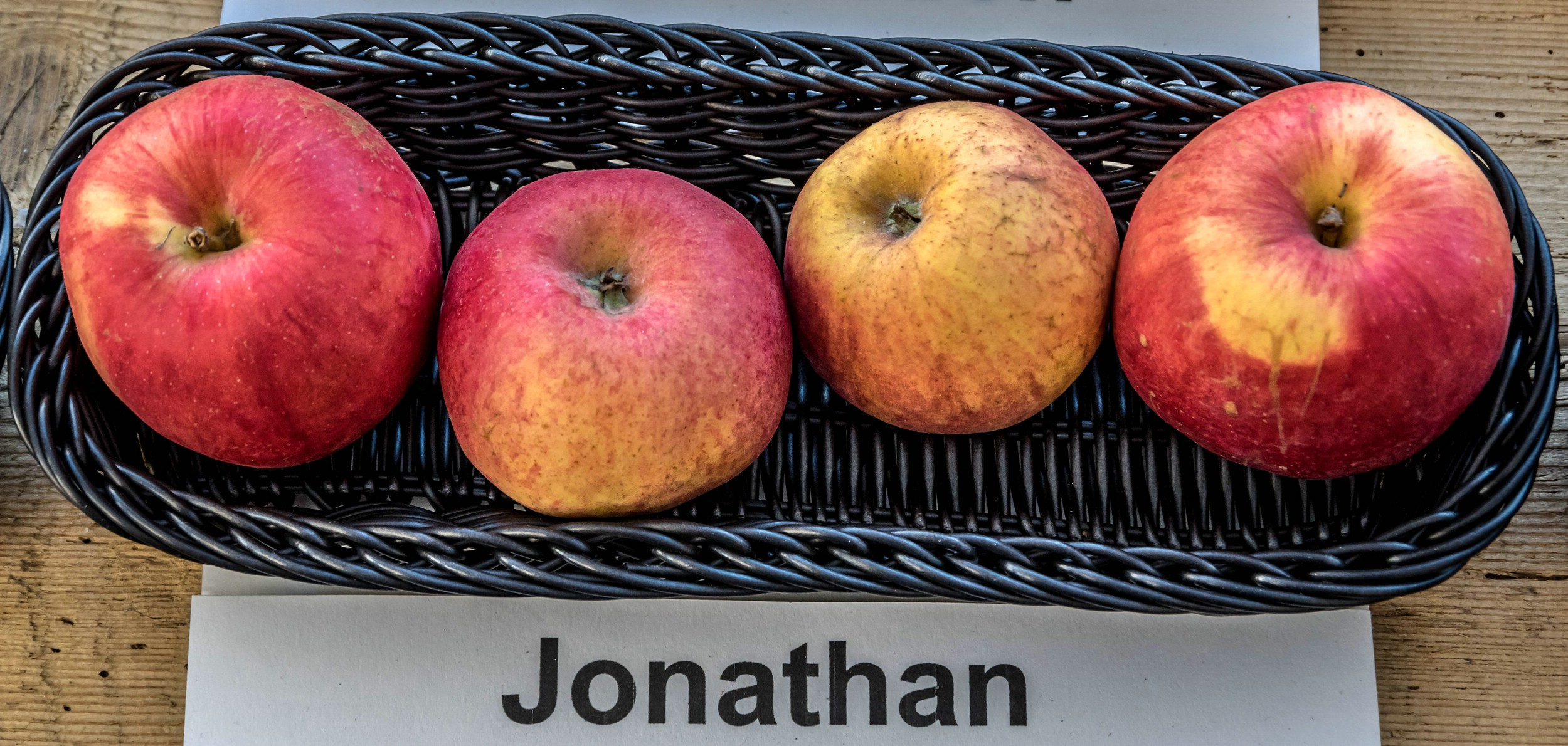 Alte Apfelsorten, von denen es im Badischen noch tragende Bäume gibt. Alle Aufnahmen au dem Oktober 2015